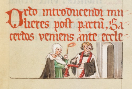 "Hervorsegnung" einer Wöchnerin, St. Gallen cod. sang. 442 p. 107